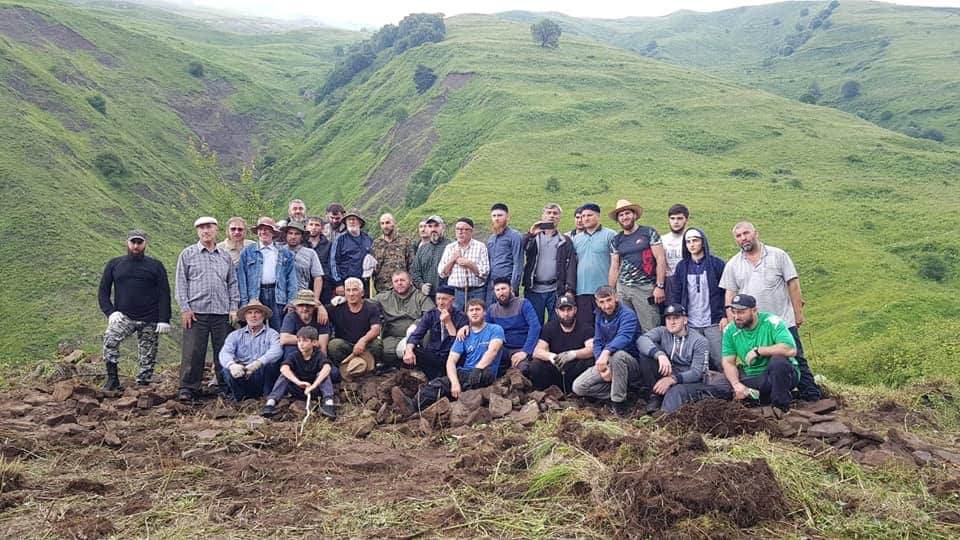 Гендаргной на месте, где стояла башня родоначальника тайпа. Этот файл ранее мною был добавлен в разные соцсети, в том числе и на канале Gendargenoy на Ютубе. (В общем, везде автор загрузки я). Могу подтвердить это любое время, оставив нужный комментарий от канала.